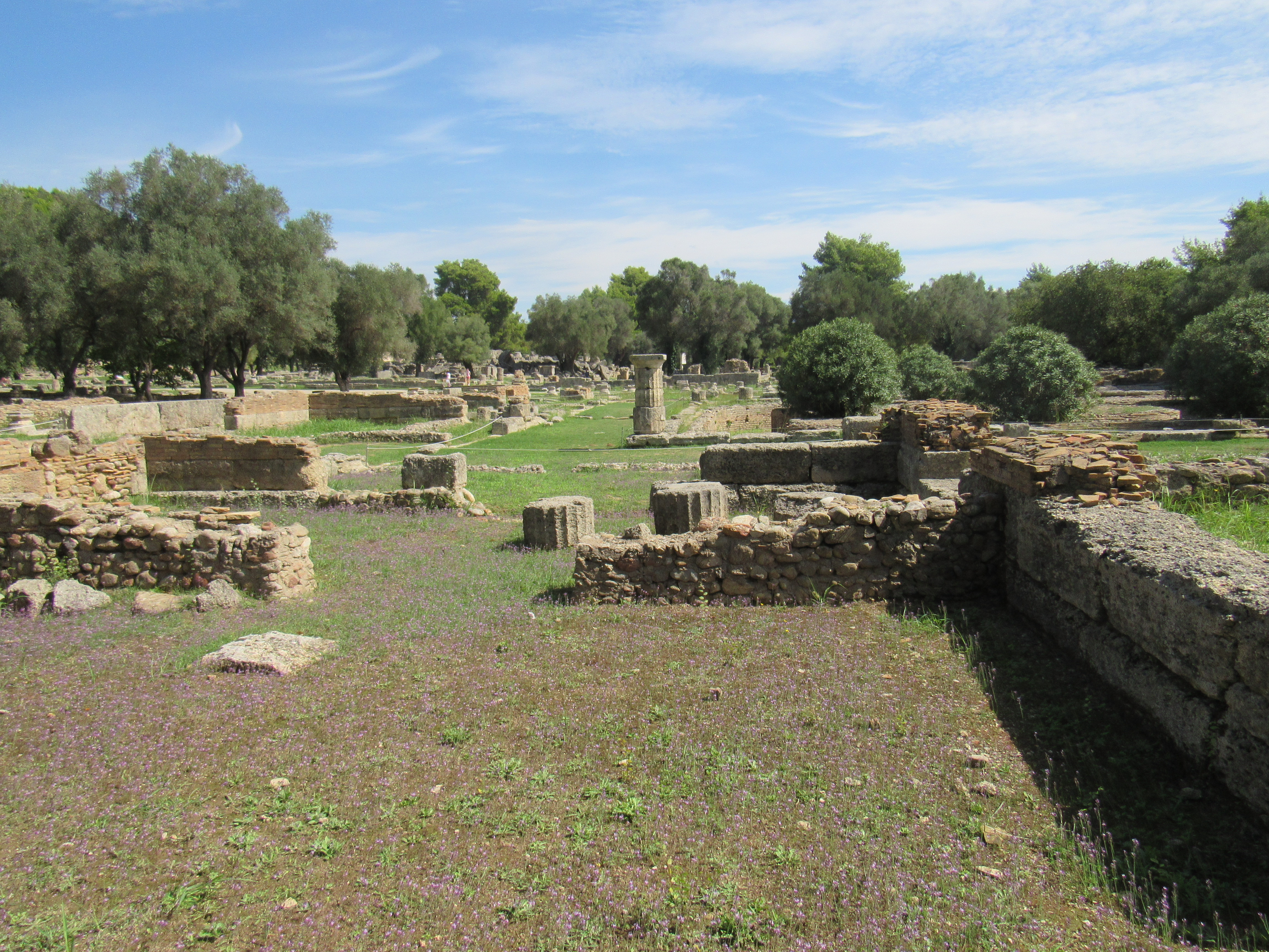 Λεωνιδαίο«Λεωνιδαίο»